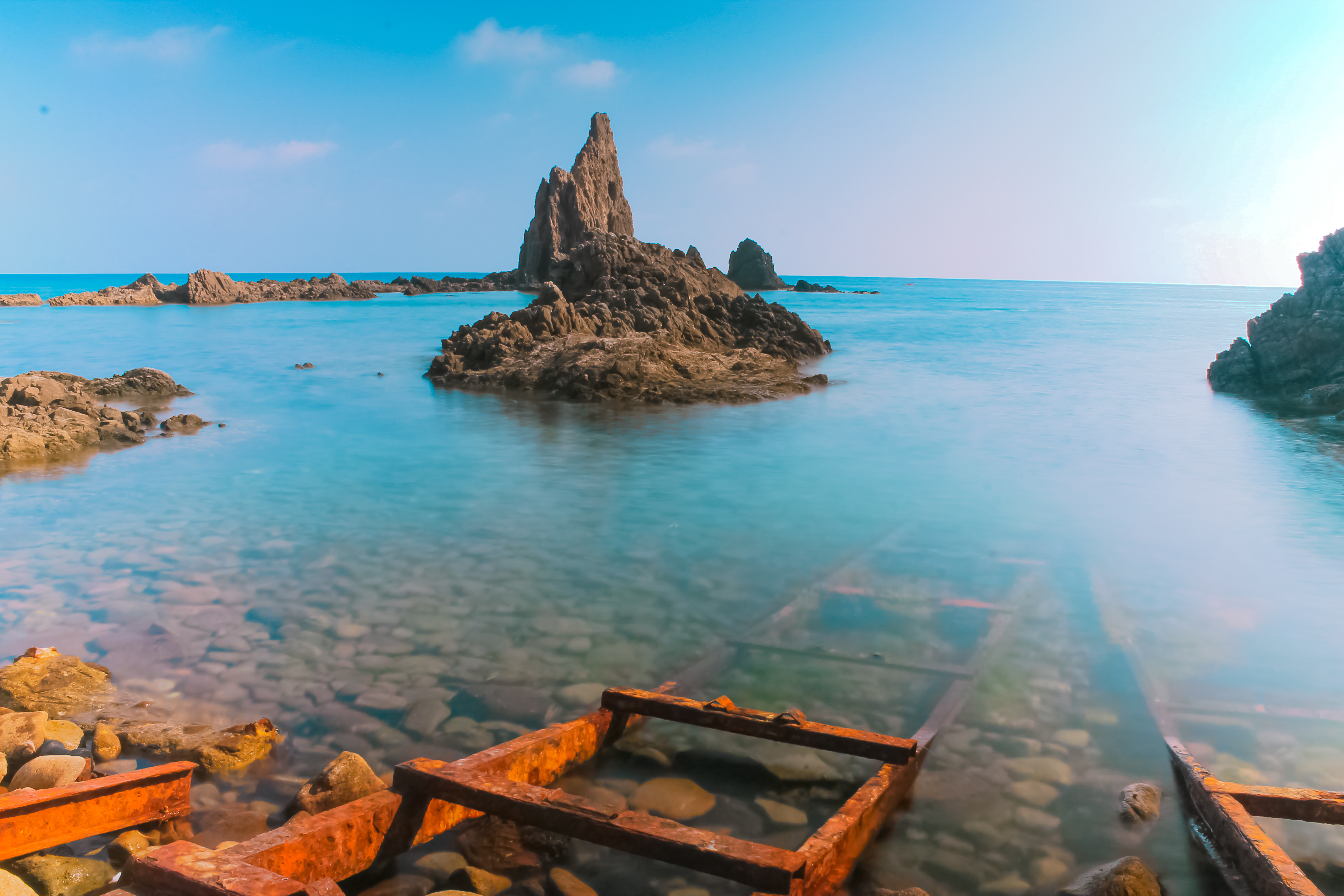 Parque natural del Cabo de Gata-Níjar This is a photography of a Special Area of Conservation in Spain with the ID: ES0000046. Natura2000 entry, EEA entry